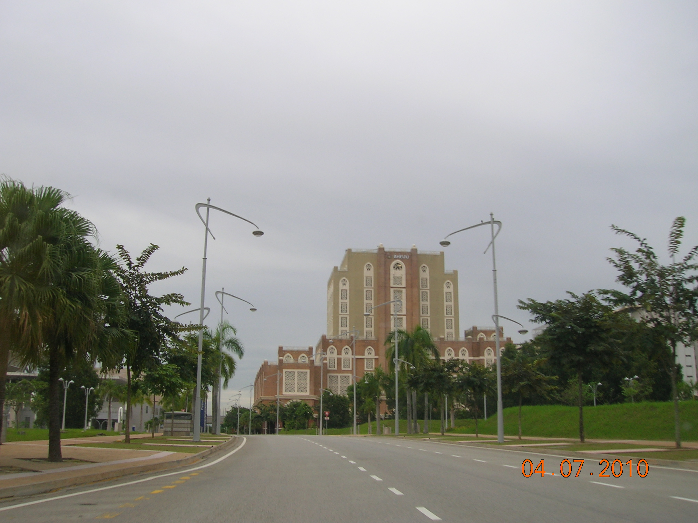 Jabatan Insolvensi Malaysia (Malaysia Department of Insolvency), Bangunan Hal Ehwal Undang-Undang (BHEUU) Legal Affairs Building, Presint 3, Pusat Pentadbiran Kerajaan Persekutuan (Federal Government Administrative Centre), 62692 Wilayah Persekutuan Putrajaya